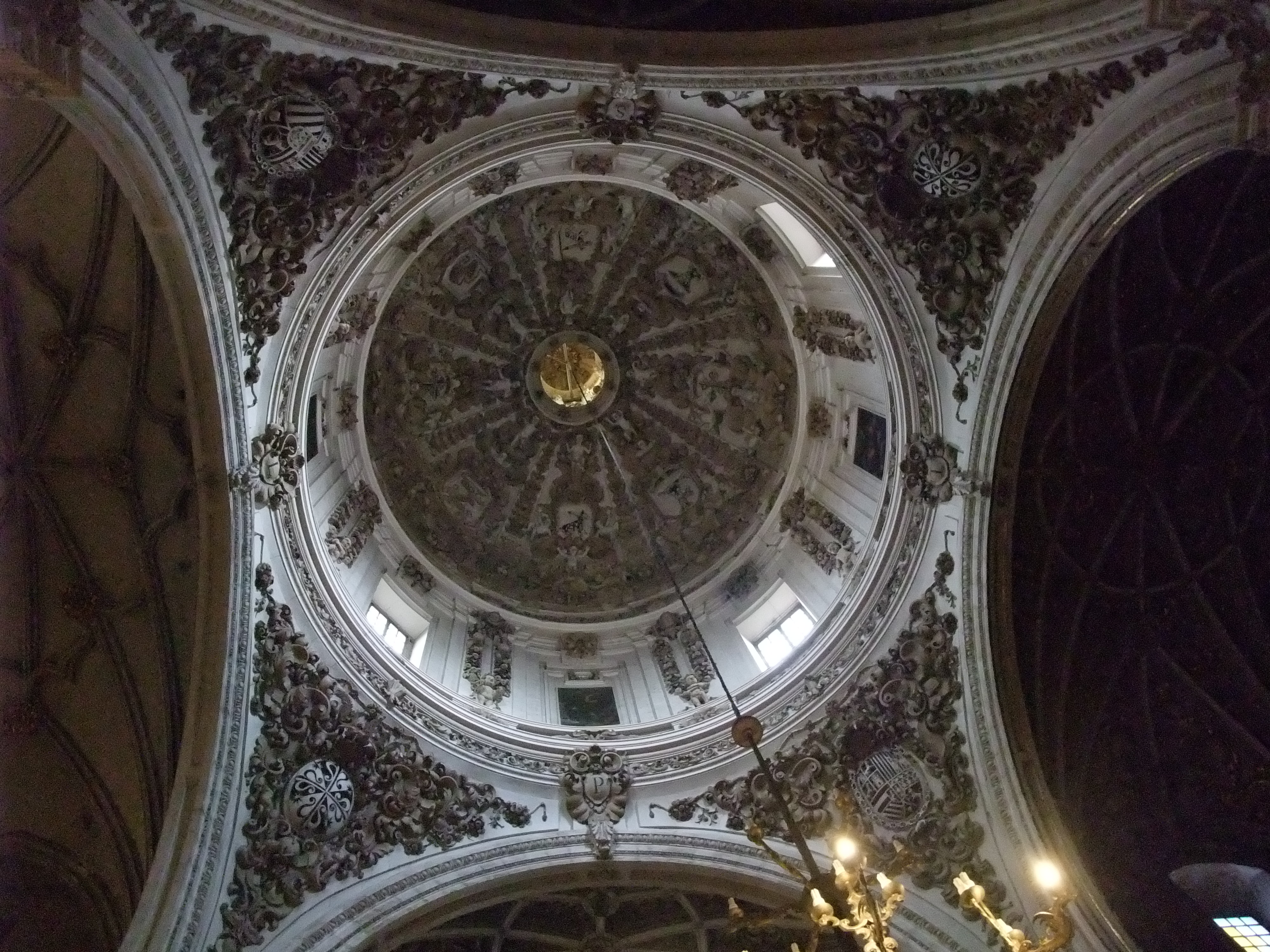 Granada-Iglesia de Santo Domingo-2-Cúpula